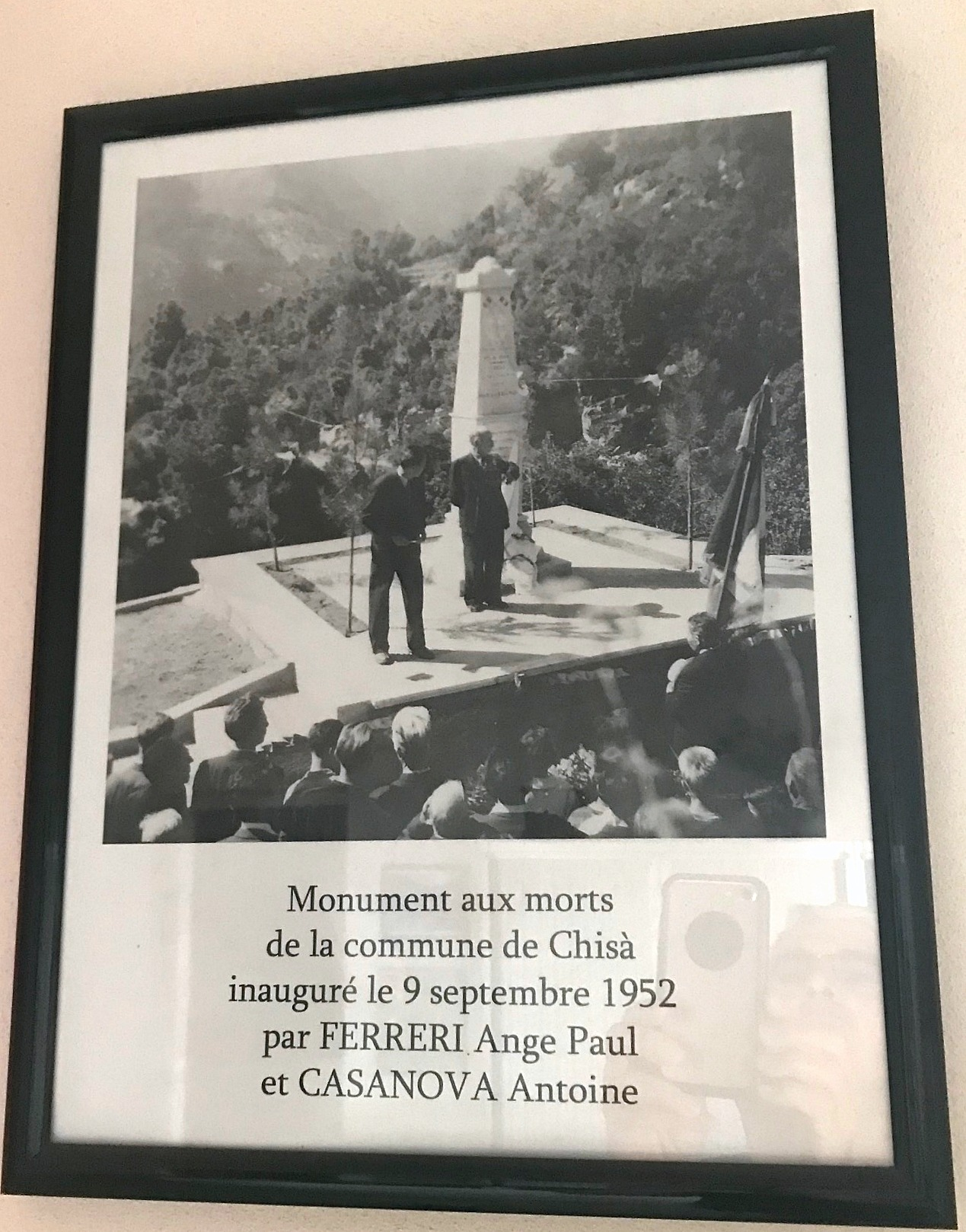 photo d'un cadre photo accroché au mur dans la mairie du village